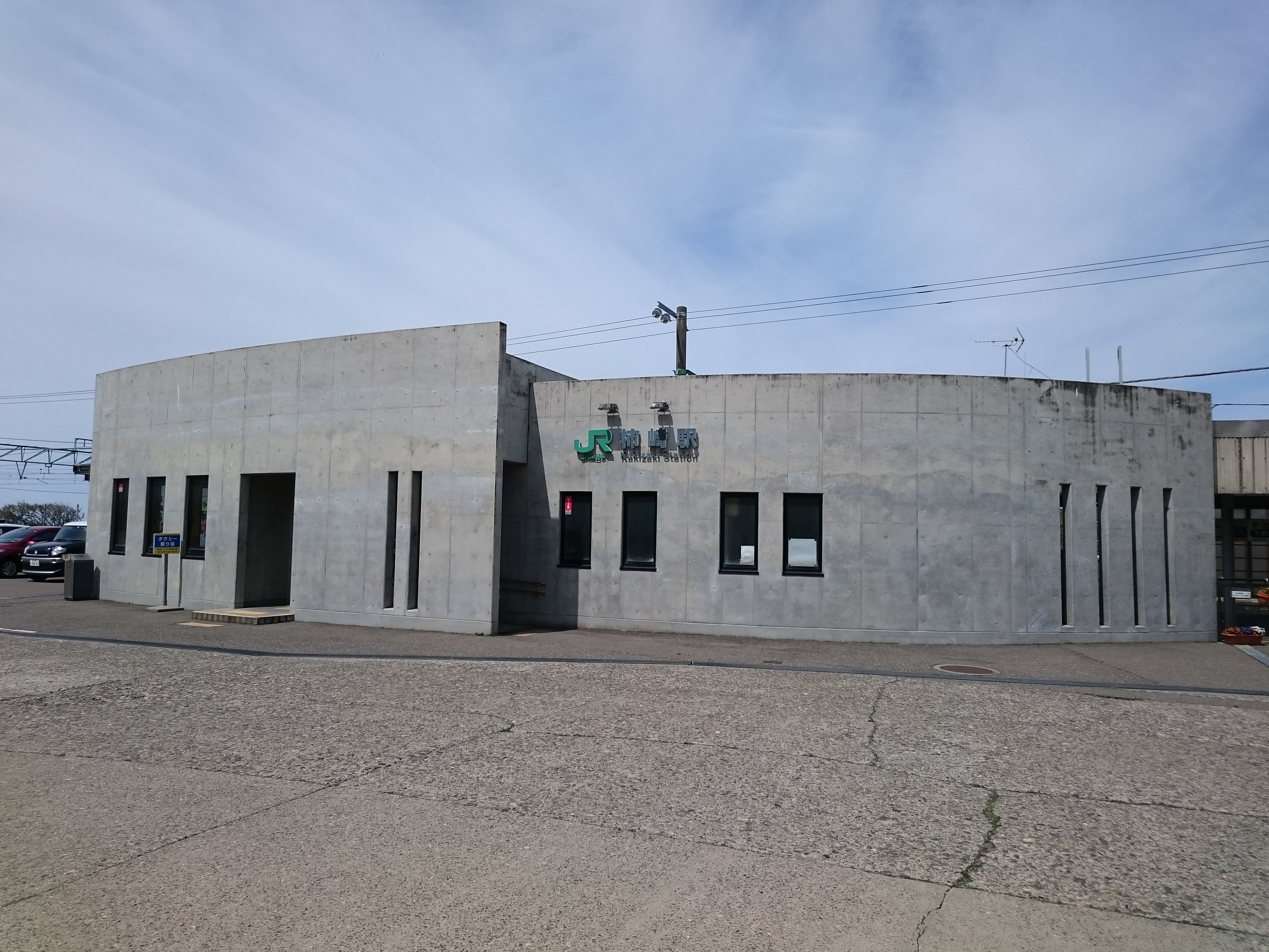 柿崎駅の駅舎外観